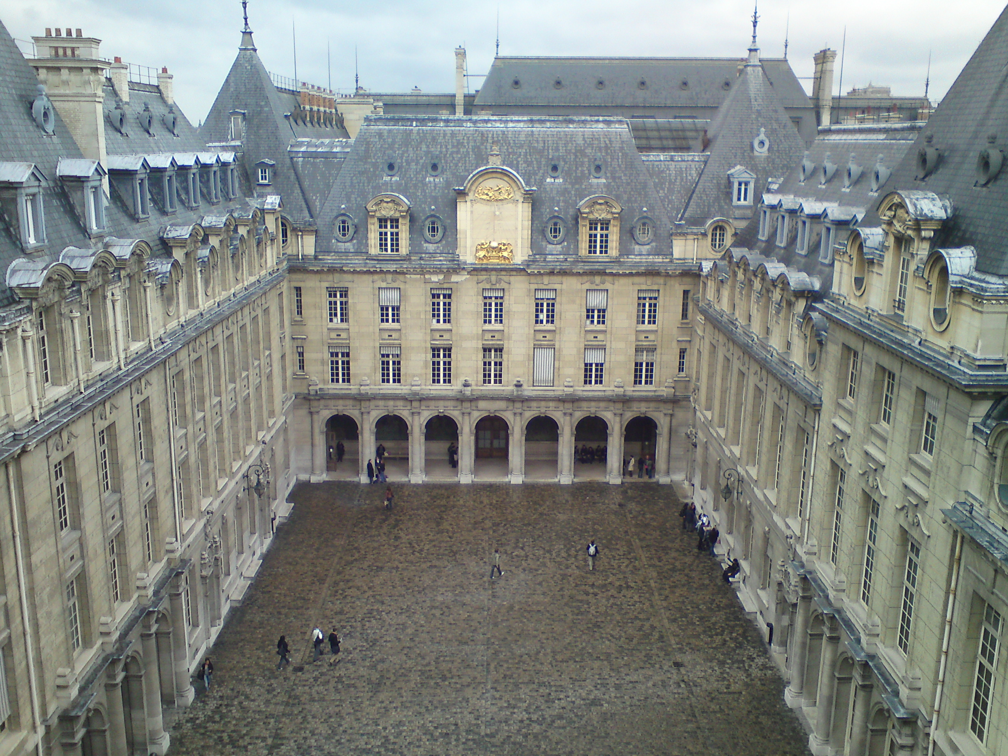 cour intérieur de la Sorbonne vue du haut de la chapelle .